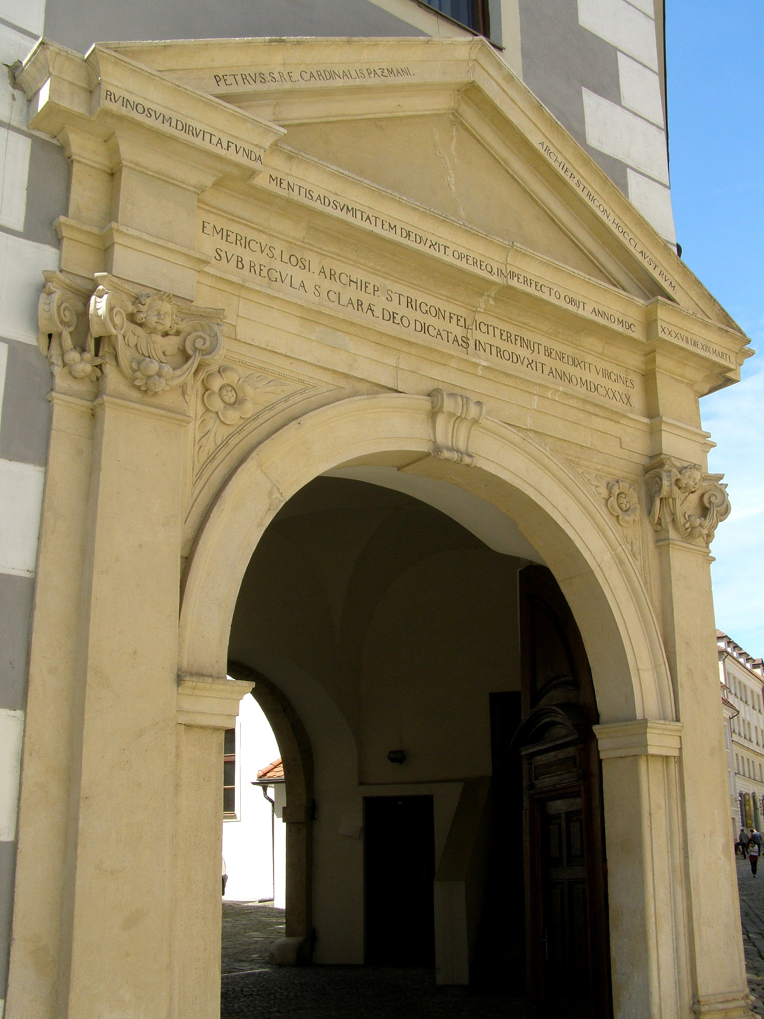 Detail vchodu do kláštora